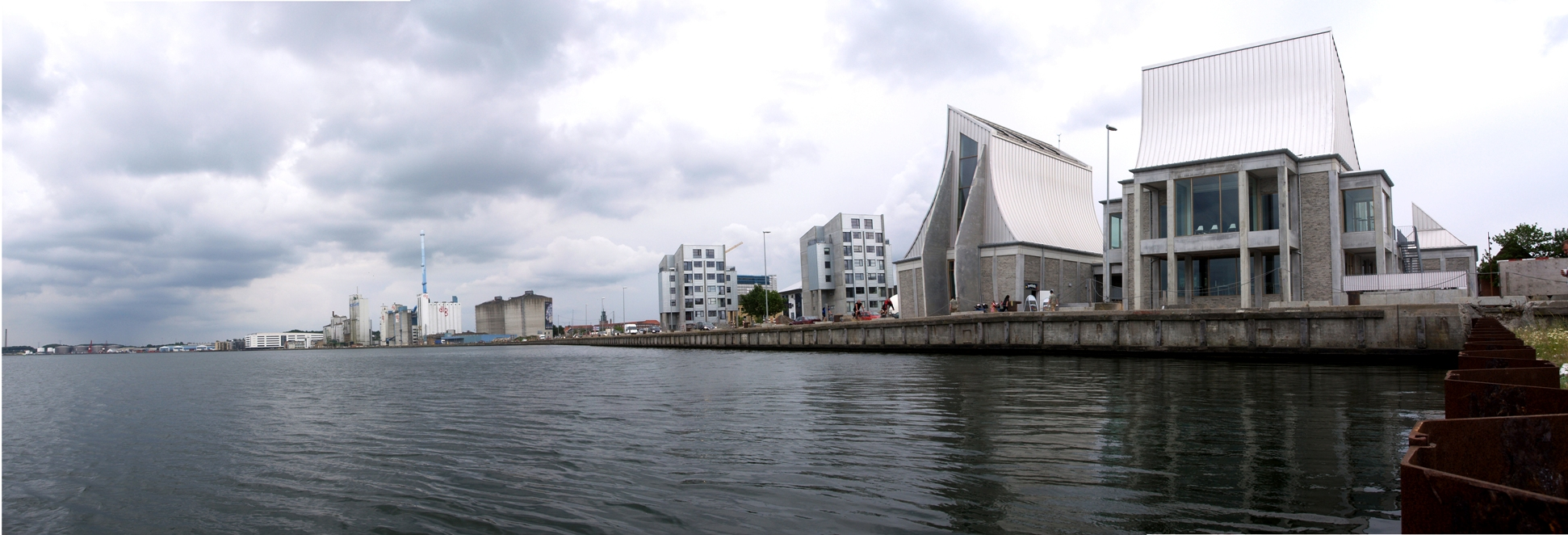 Utzon Center Ålborg, Juli 2009.